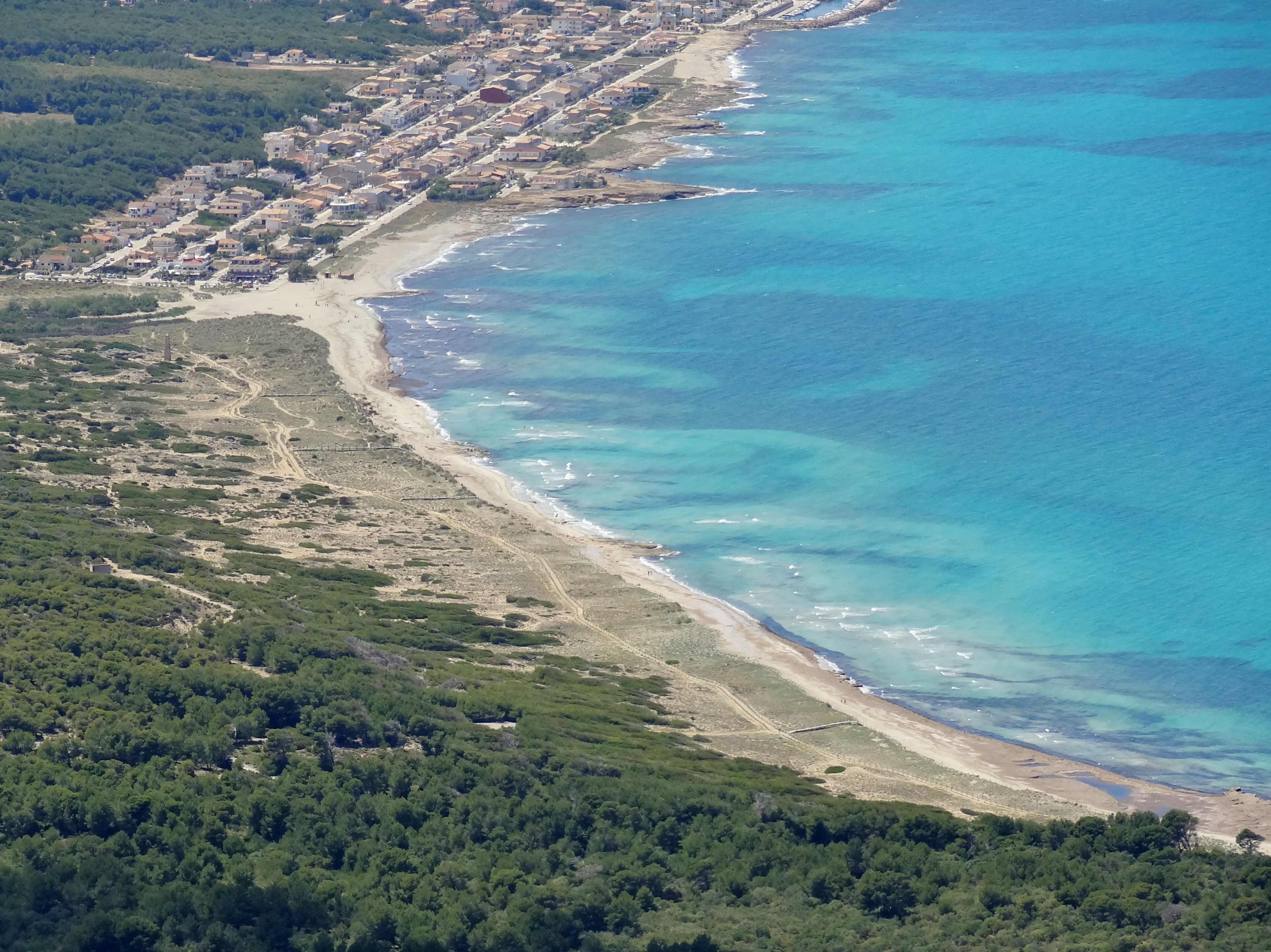 S’Arenal de Sa Canova in der Gemeinde Artà, Mallorca, Spanien. Fotografiert vom Puig de Ferrutx.